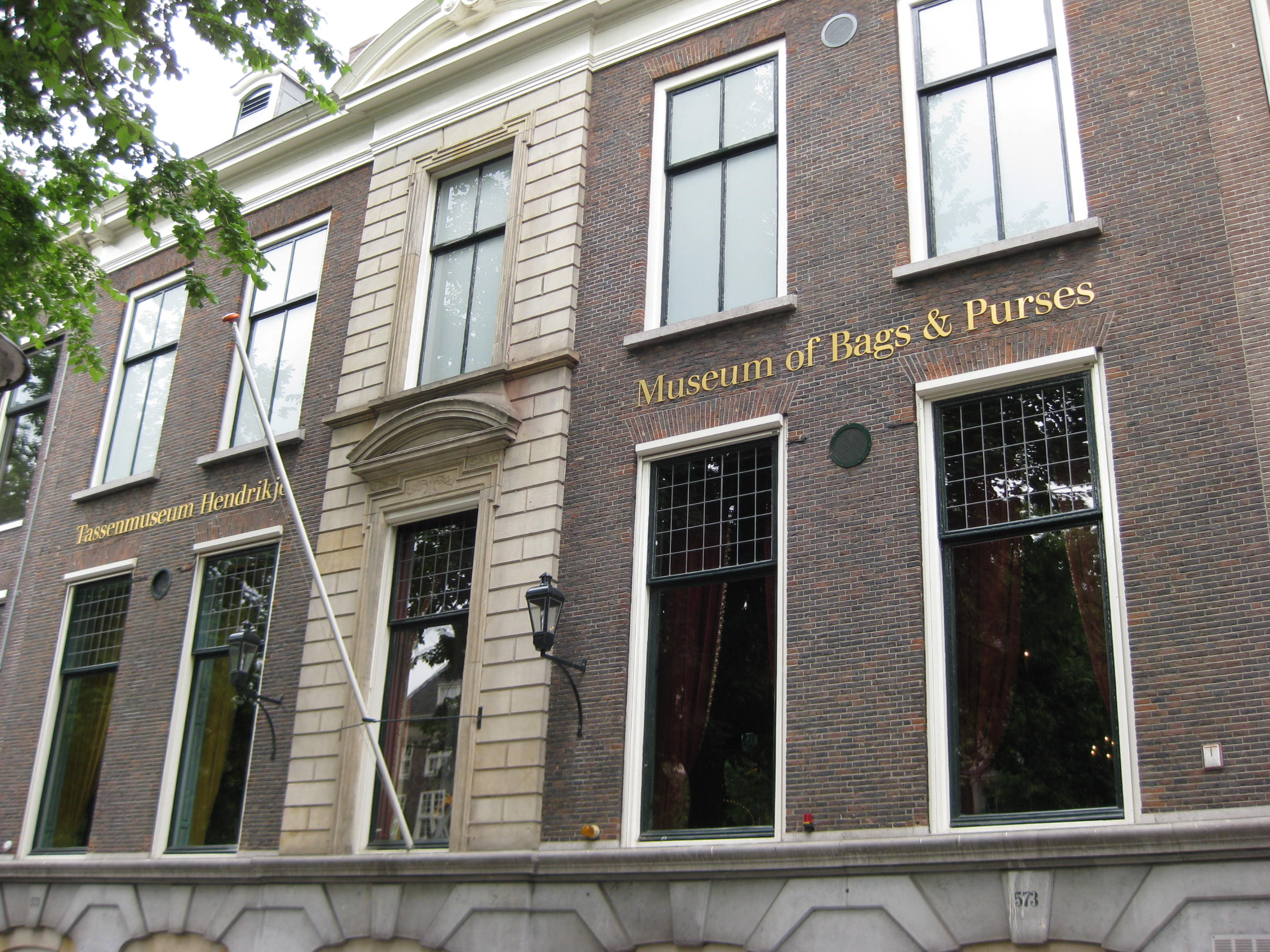 Tassenmuseum Hendrikje in Amsterdam